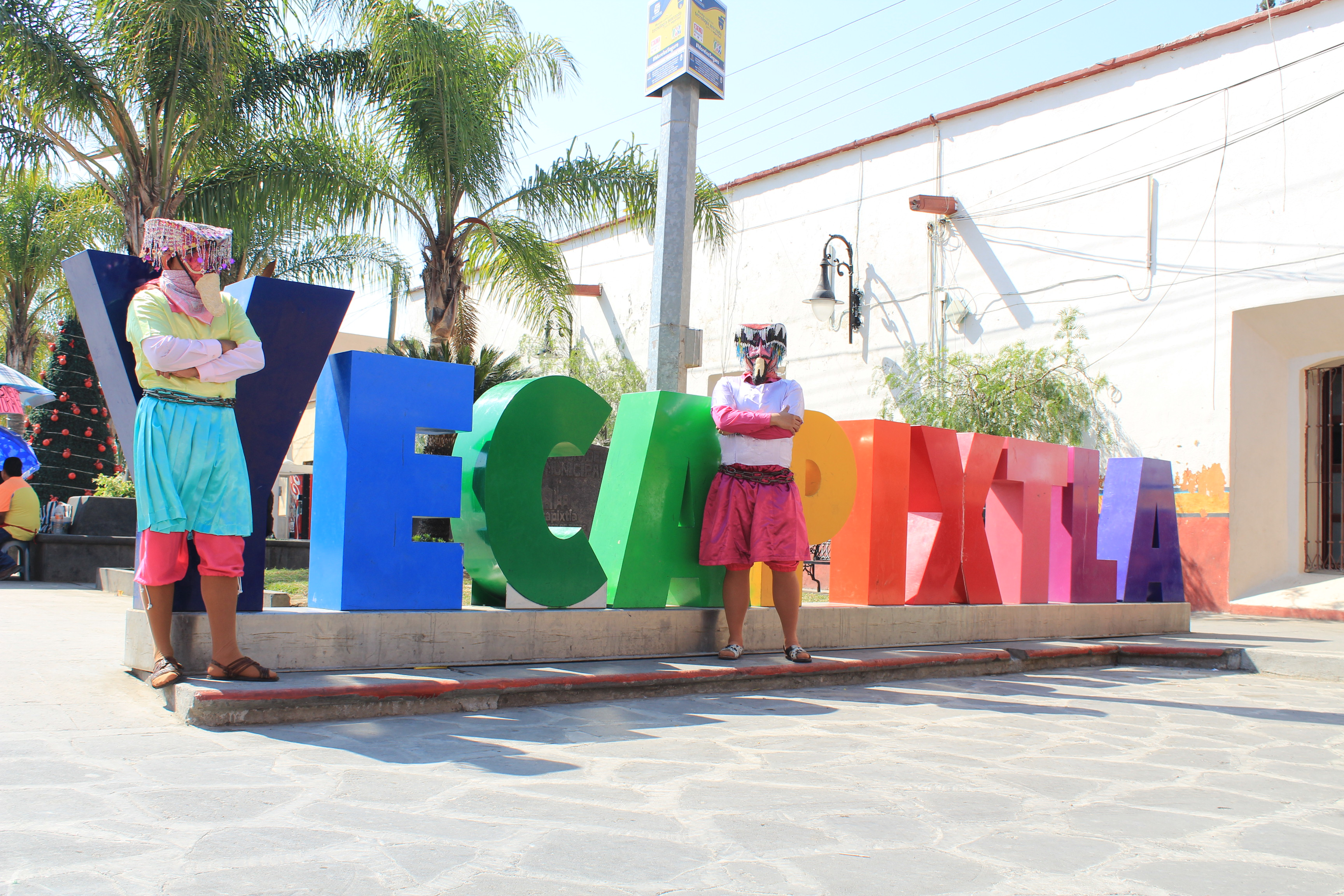 Letras Monumentales de Yecapixla